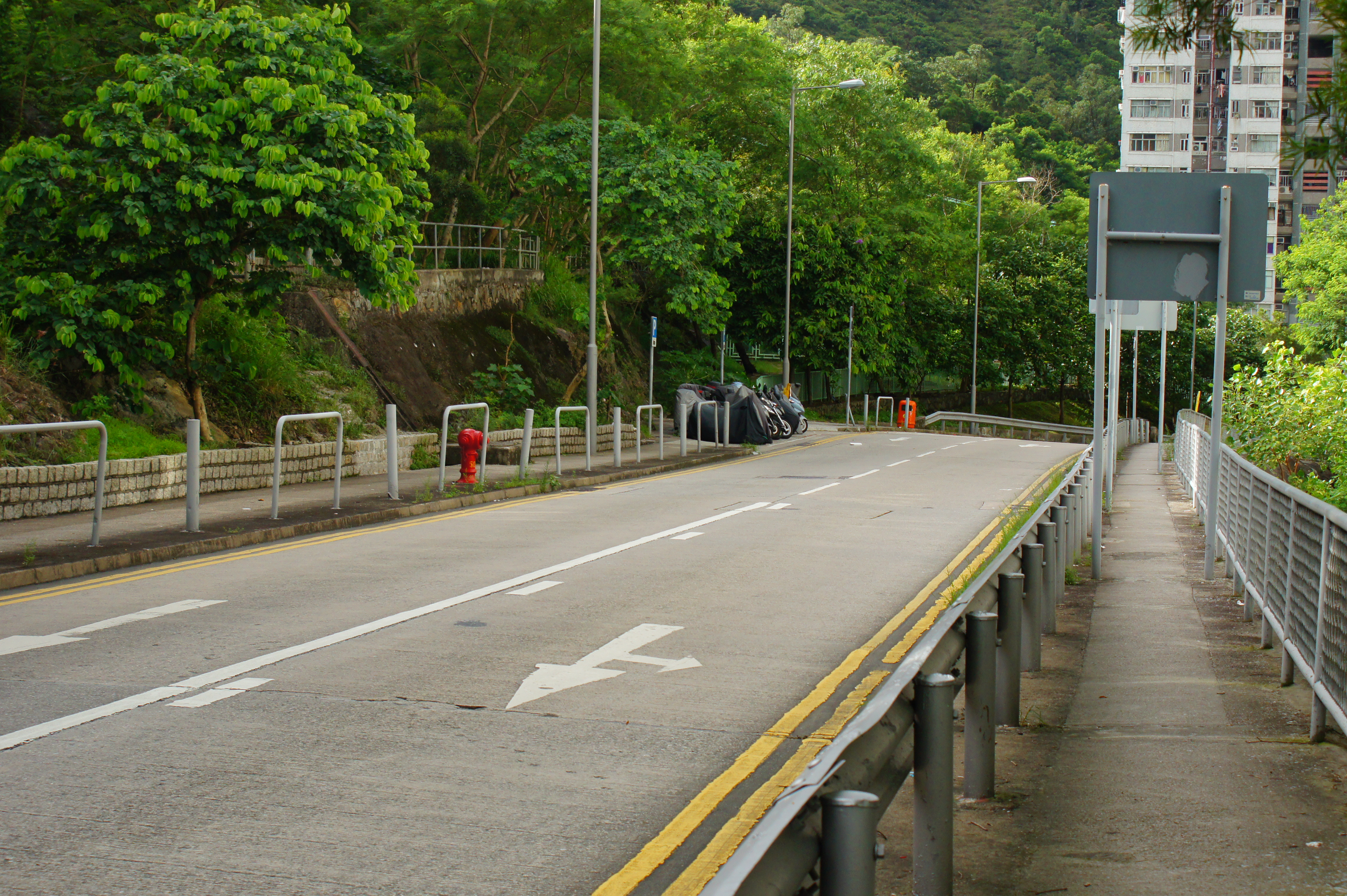 中文（香港）: Tsui Lam Road 翠琳路